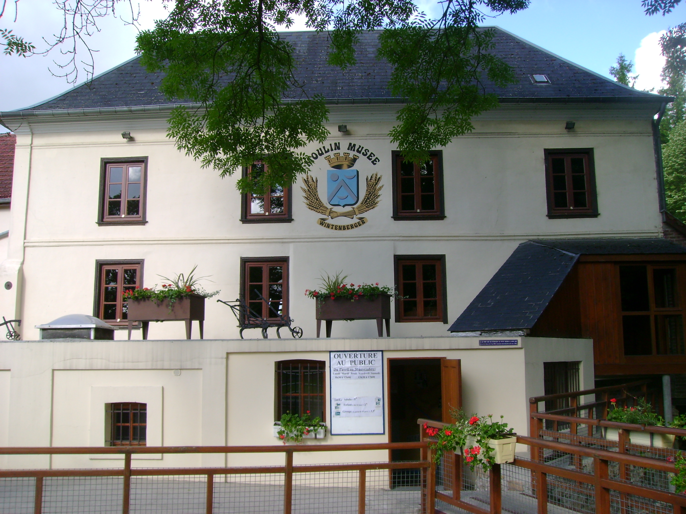 La façade du Moulin-Musée